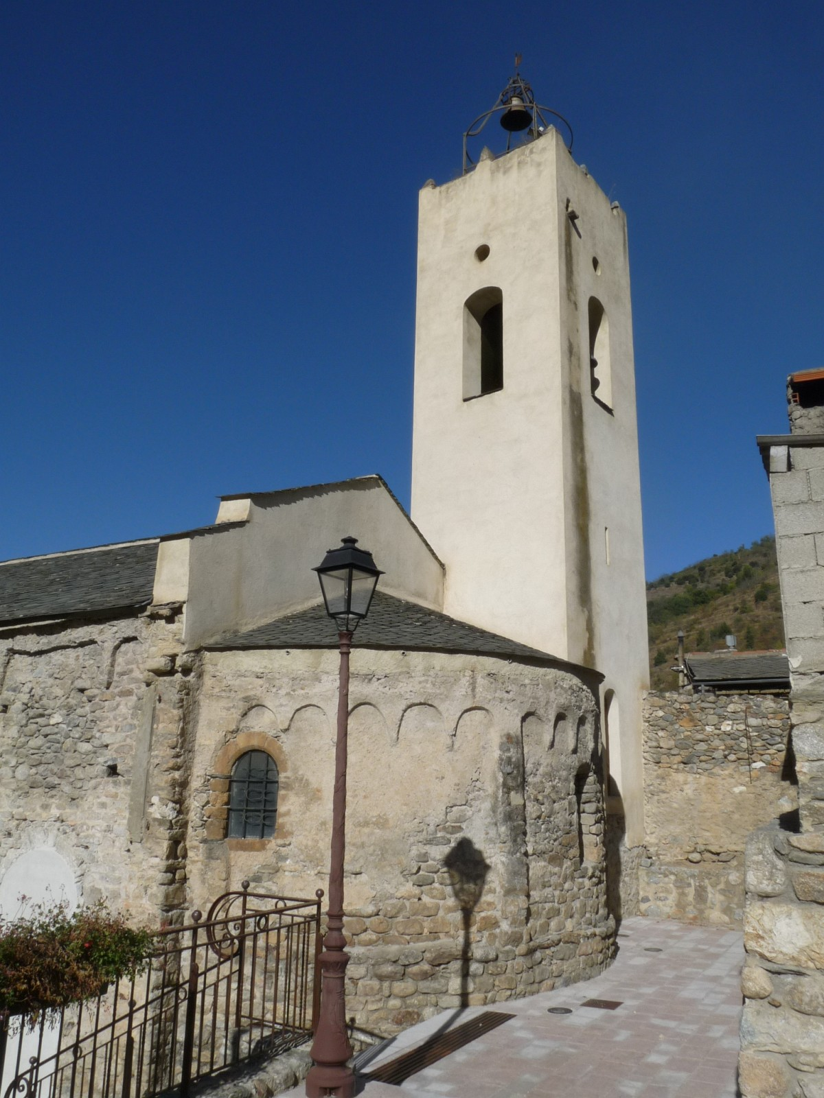 Eglise de Nyer, Pyrénées-Orientales, France